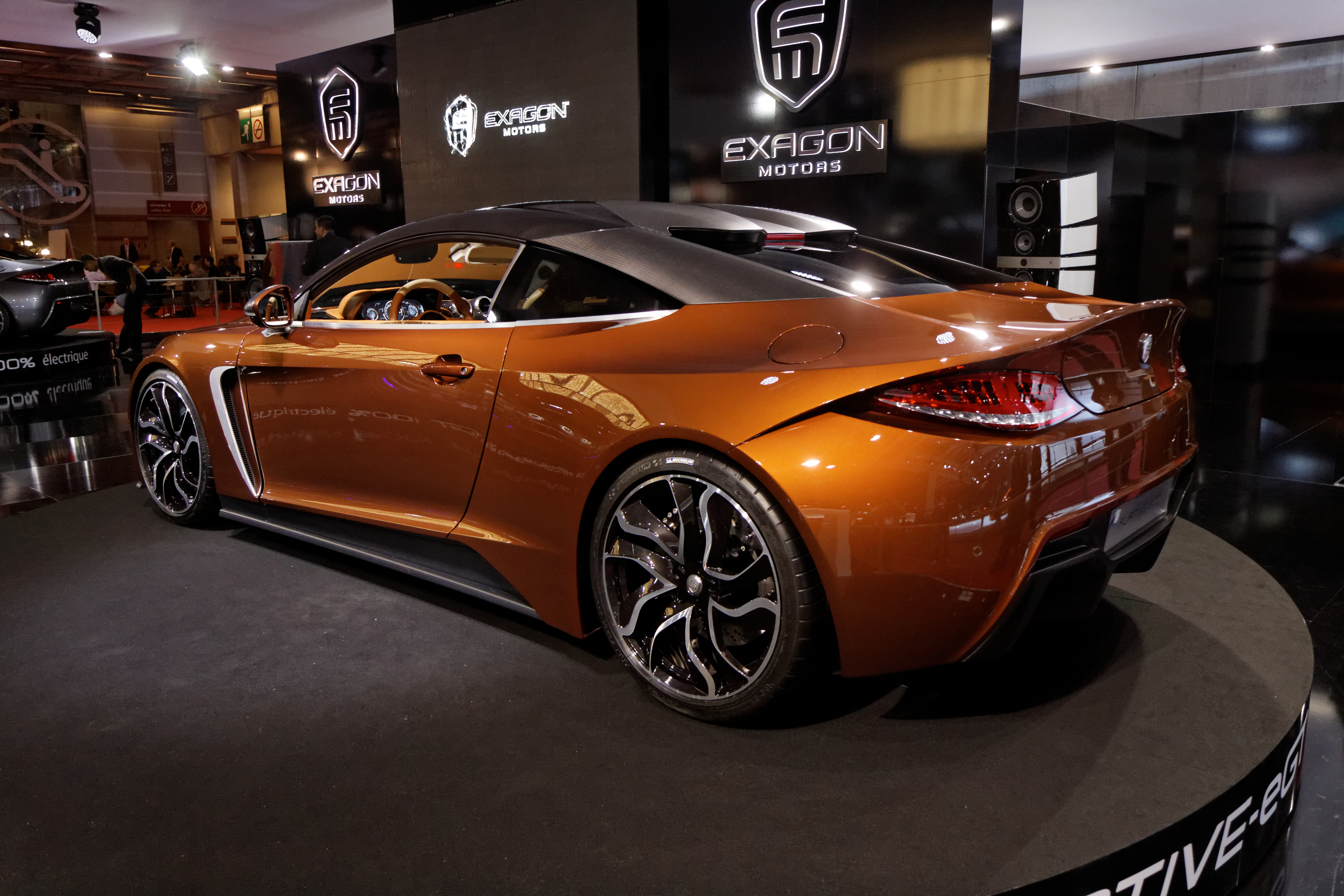 Une Exagon Furtive eGt présentée lors du Mondial de l'automobile de Paris 2012.